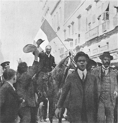 "Le président Madero parcourant à cheval les rues voisines du Palais, acclamé par ses partisans, quelques jours avant sa fin tragique."